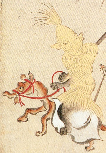 a Sanadl Spirit (草履の妖怪) from Hyakki Yakō Emaki (百鬼夜行絵巻)